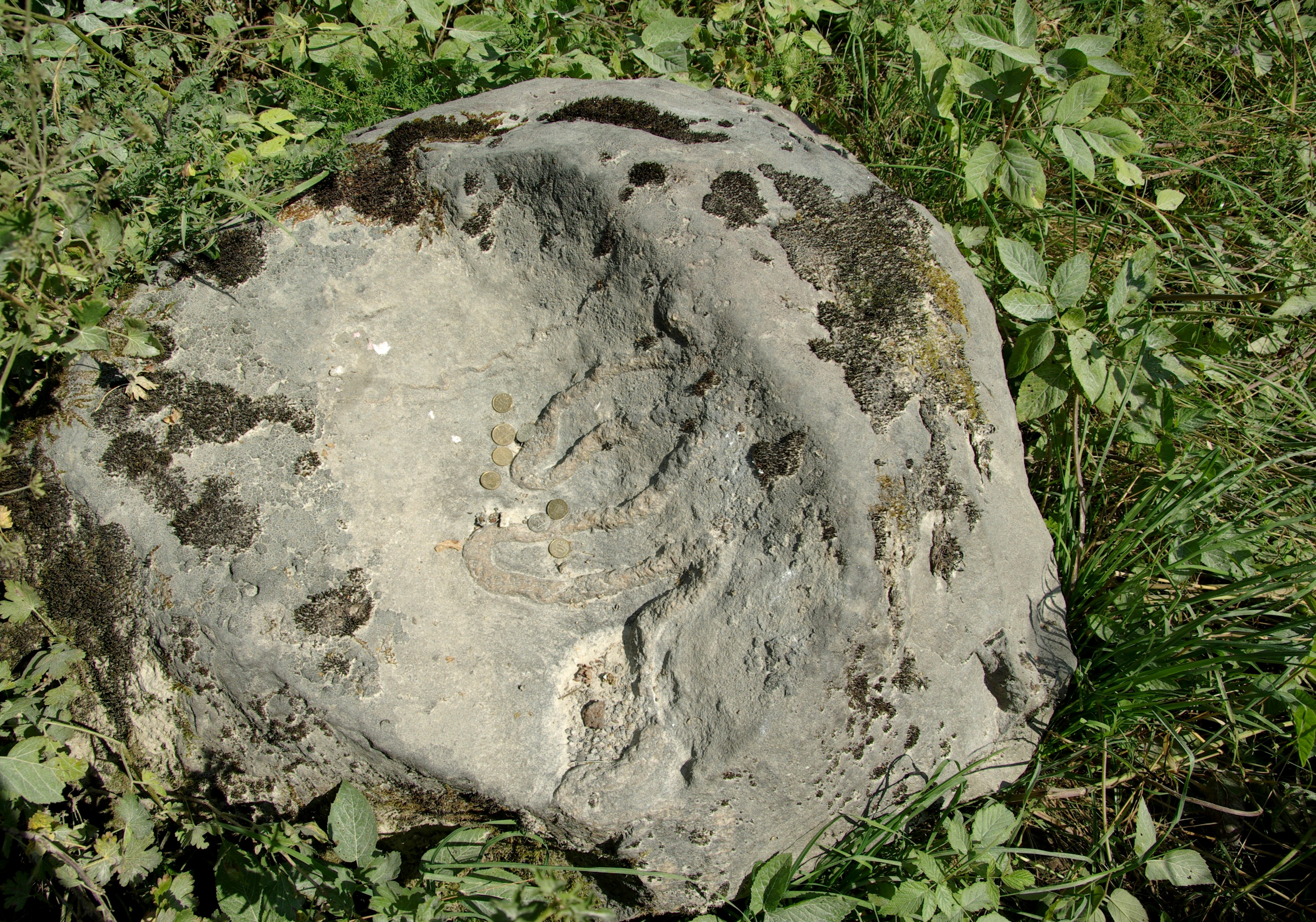 asub Harju maakonnas,Saku vallas,Lokuti külas,Tõdva-nabala kõrvalmaantee esimesel kilomeetril tee ääres rohus.